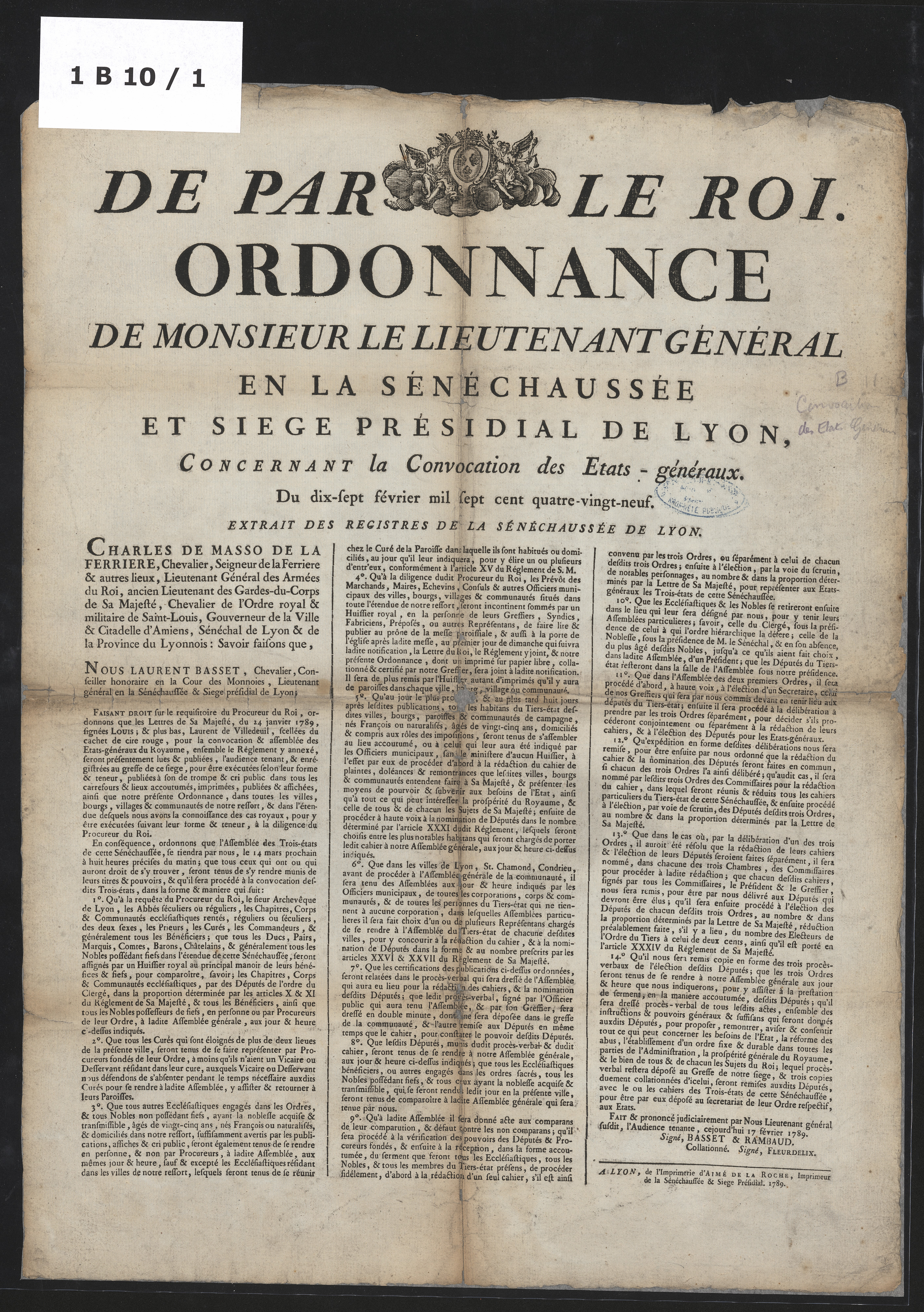 Ordonnance du Lieutenant général en la Sénéchaussée et siège présidial de Lyon concernant la convocation des États généraux du 17 février 1789, extrait des registres de la Sénéchaussée de Lyon. Convocation à l'assemblée des trois états de la sénéchaussée de Lyon le 14 mars 1789.